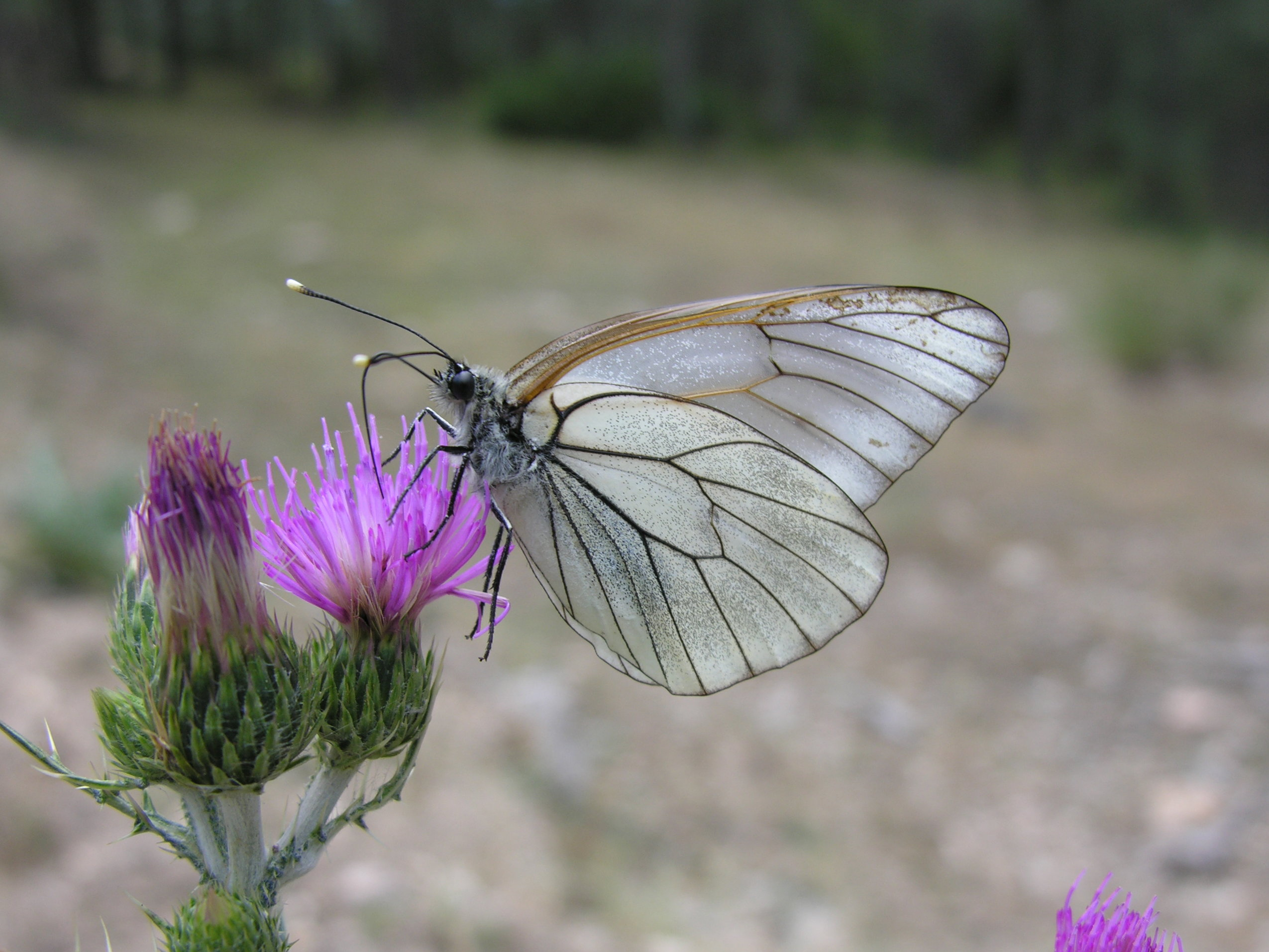 Aporia crataegi (Pieridae). Valle del Lozoya, Madrid, España.